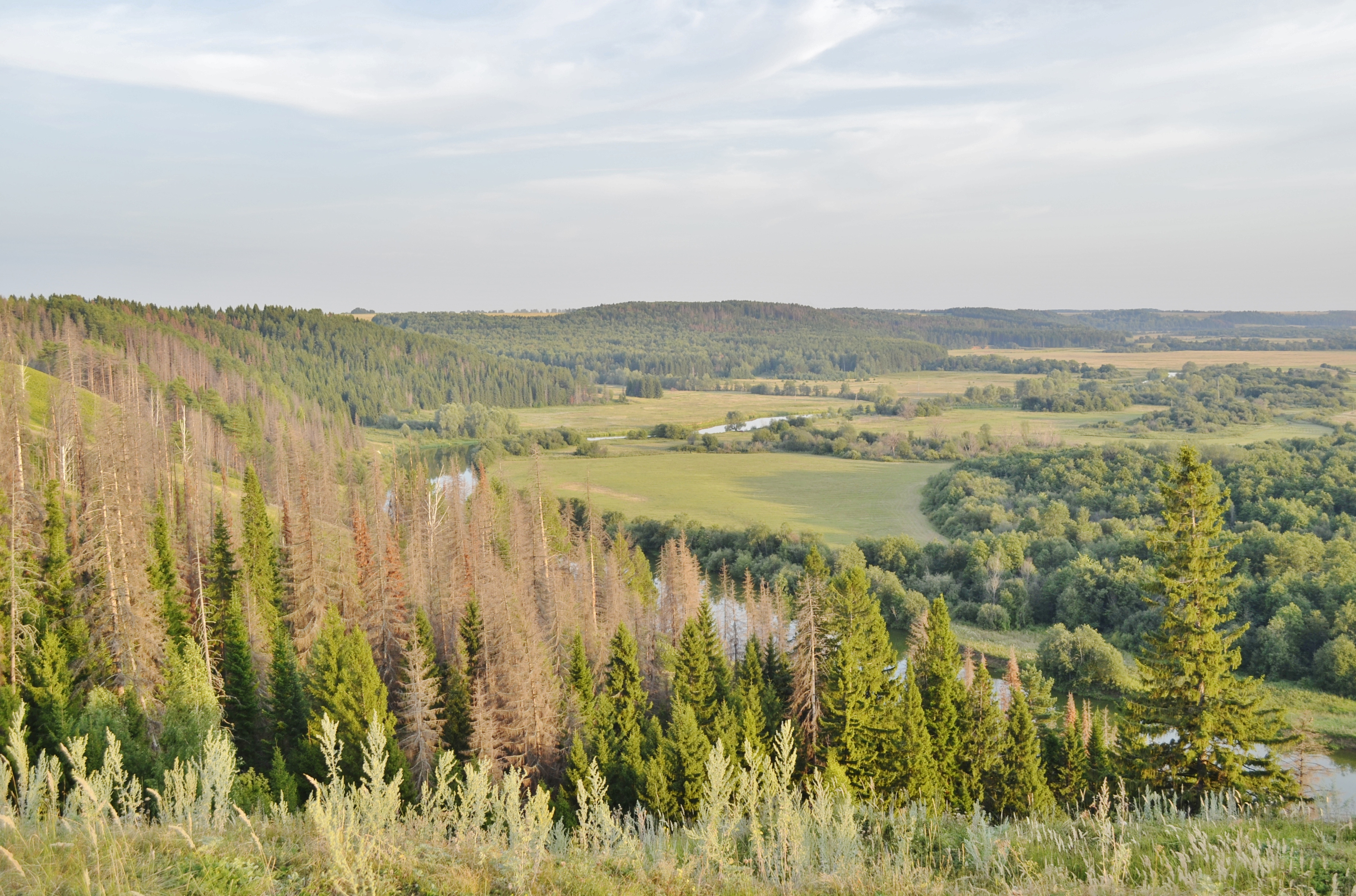 Вид на холмы на въезде в Уржум.